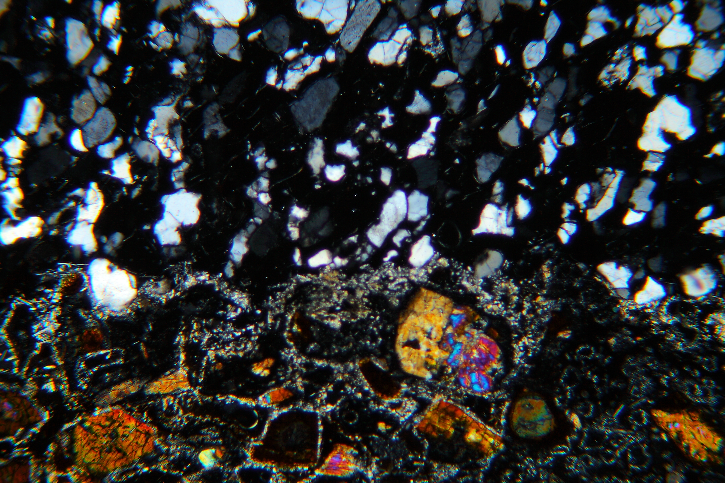 Kontakt Basalt-Buntsandstein vom Wildenstein b. Büdingen (Dünnschliff, XPL)